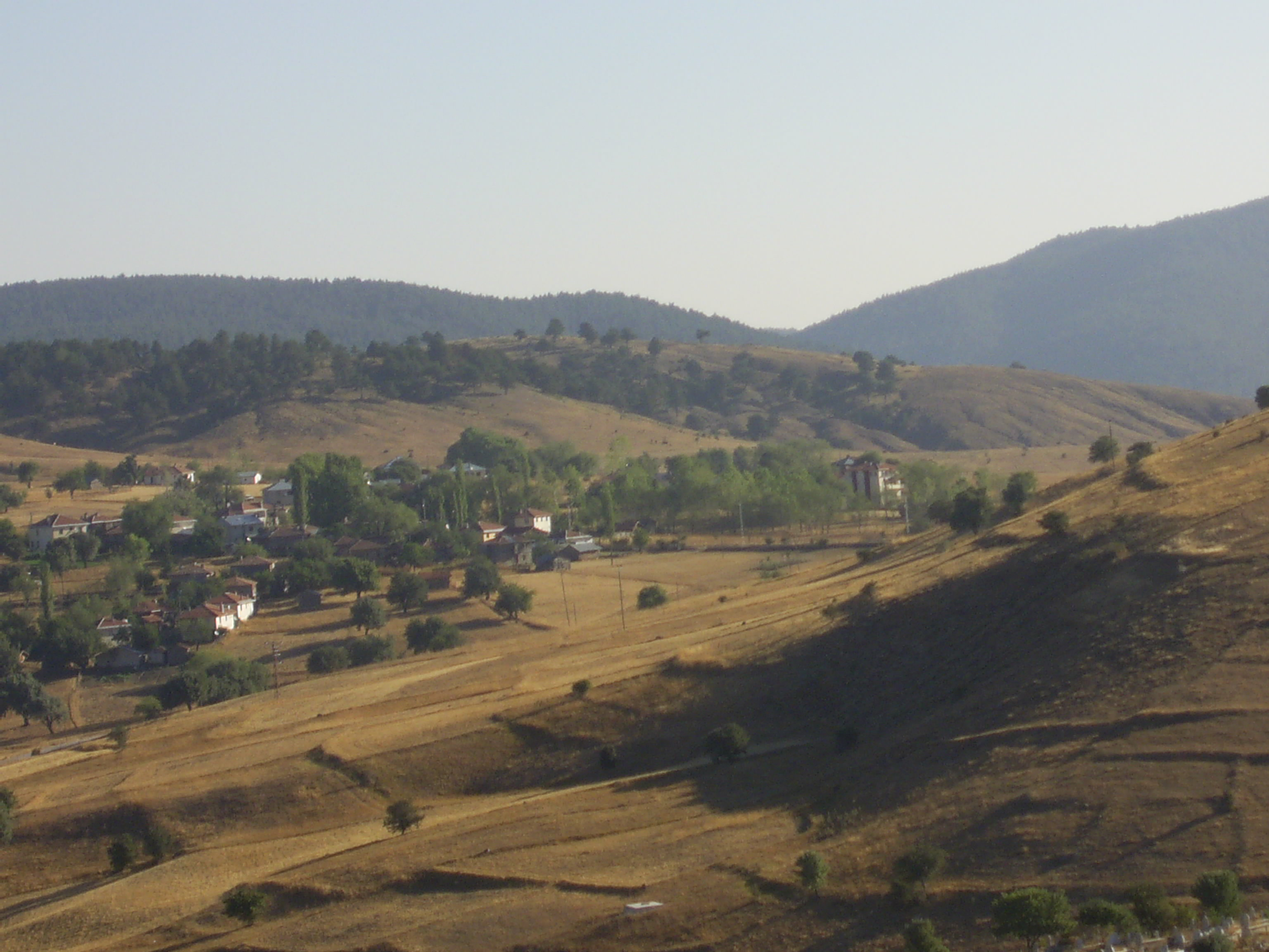 Kilkuyu, Tosya , Kastamonu